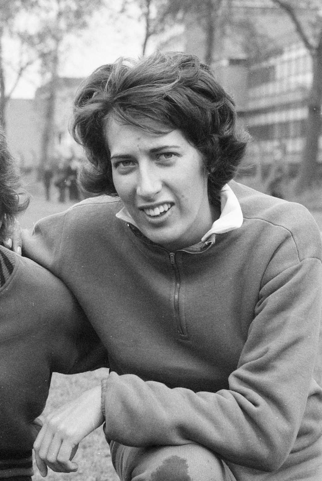 Atletiek te Rotterdam, Joke Bijleveld